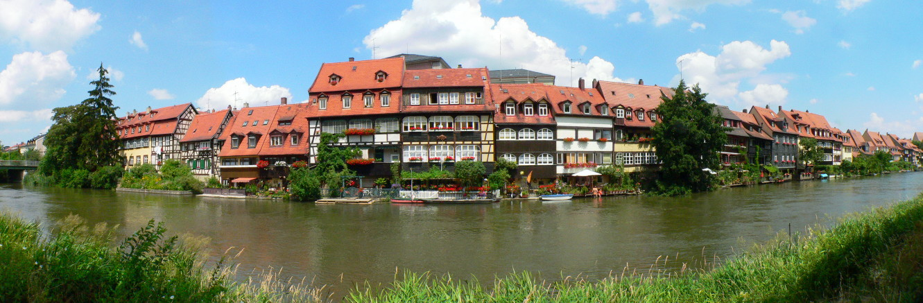 Ansicht von "Klein Venedig" in Bamberg